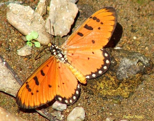 Rahul Natu